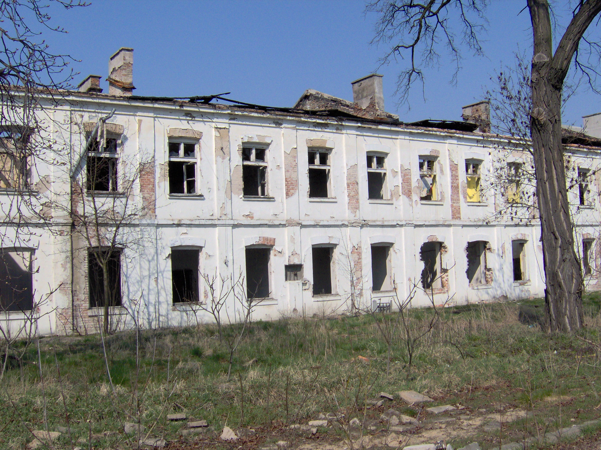 Pozostałości po byłej jednostki wojskowej przy ul. Żytniej 83 (2007 r.)